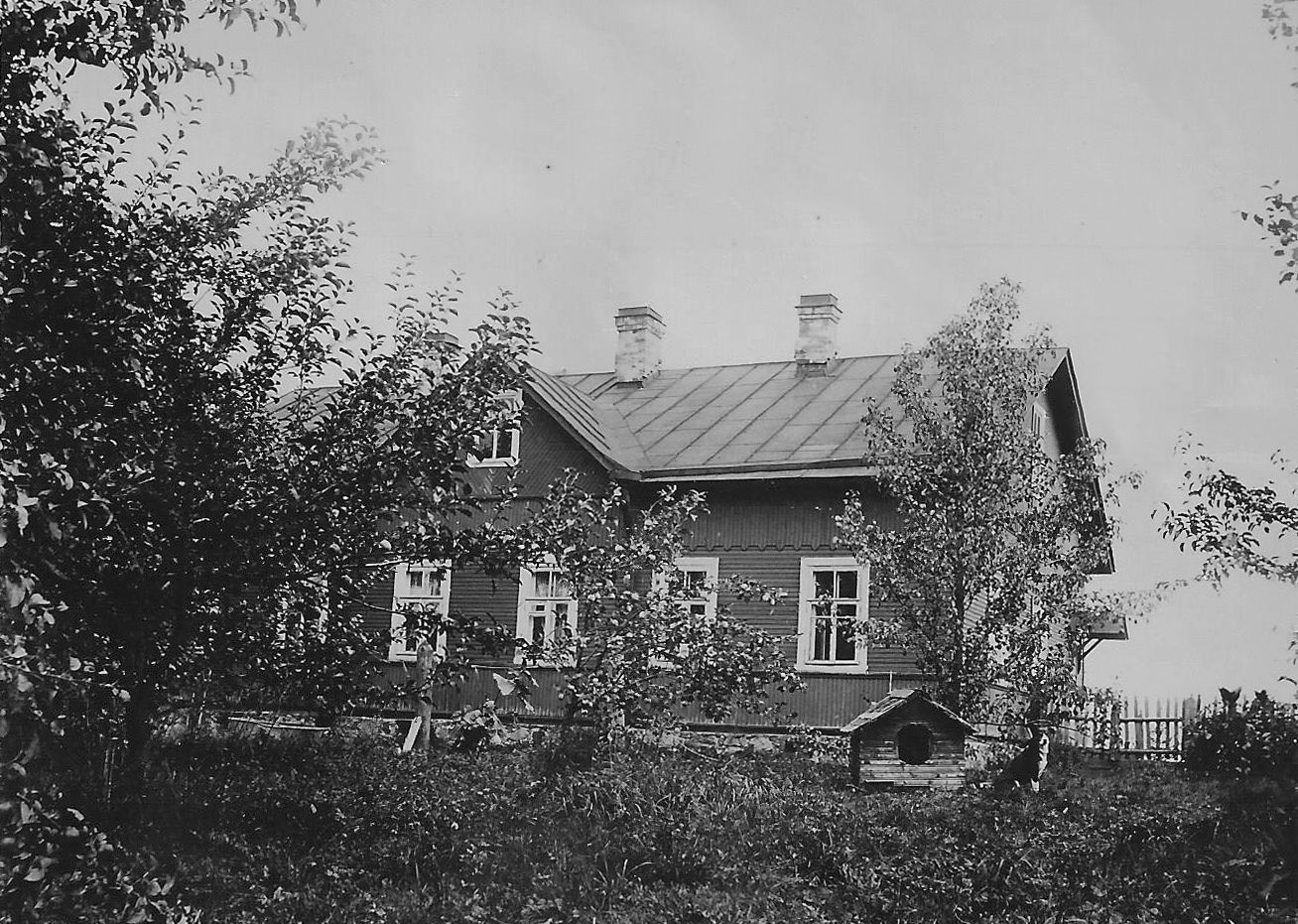 Пасторат в деревне Румболово, Рябовского лютеранского прихода.